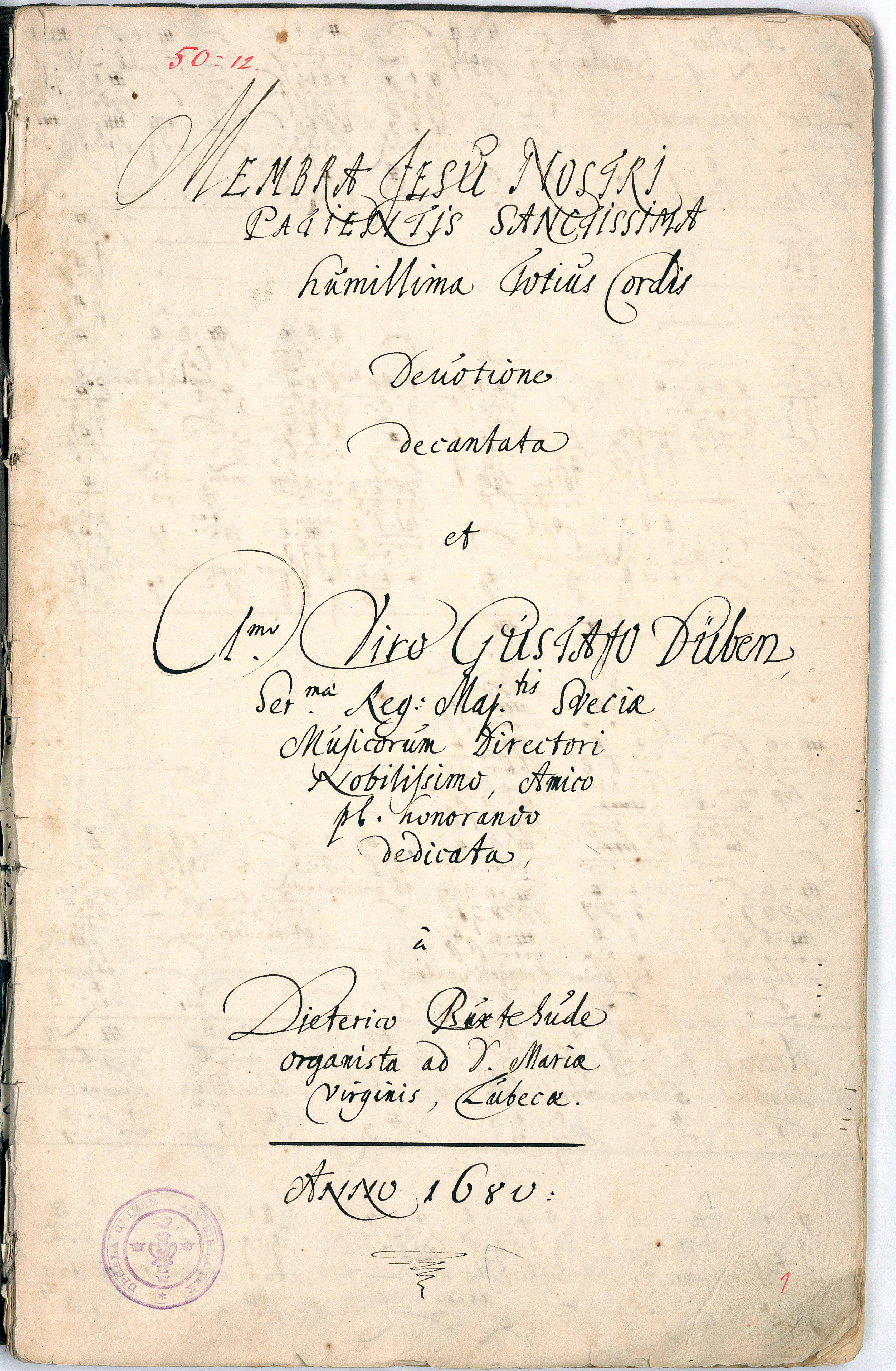 Title Page of Dieterich Buxtehude's Membra Jesu Nostri BuxWV75